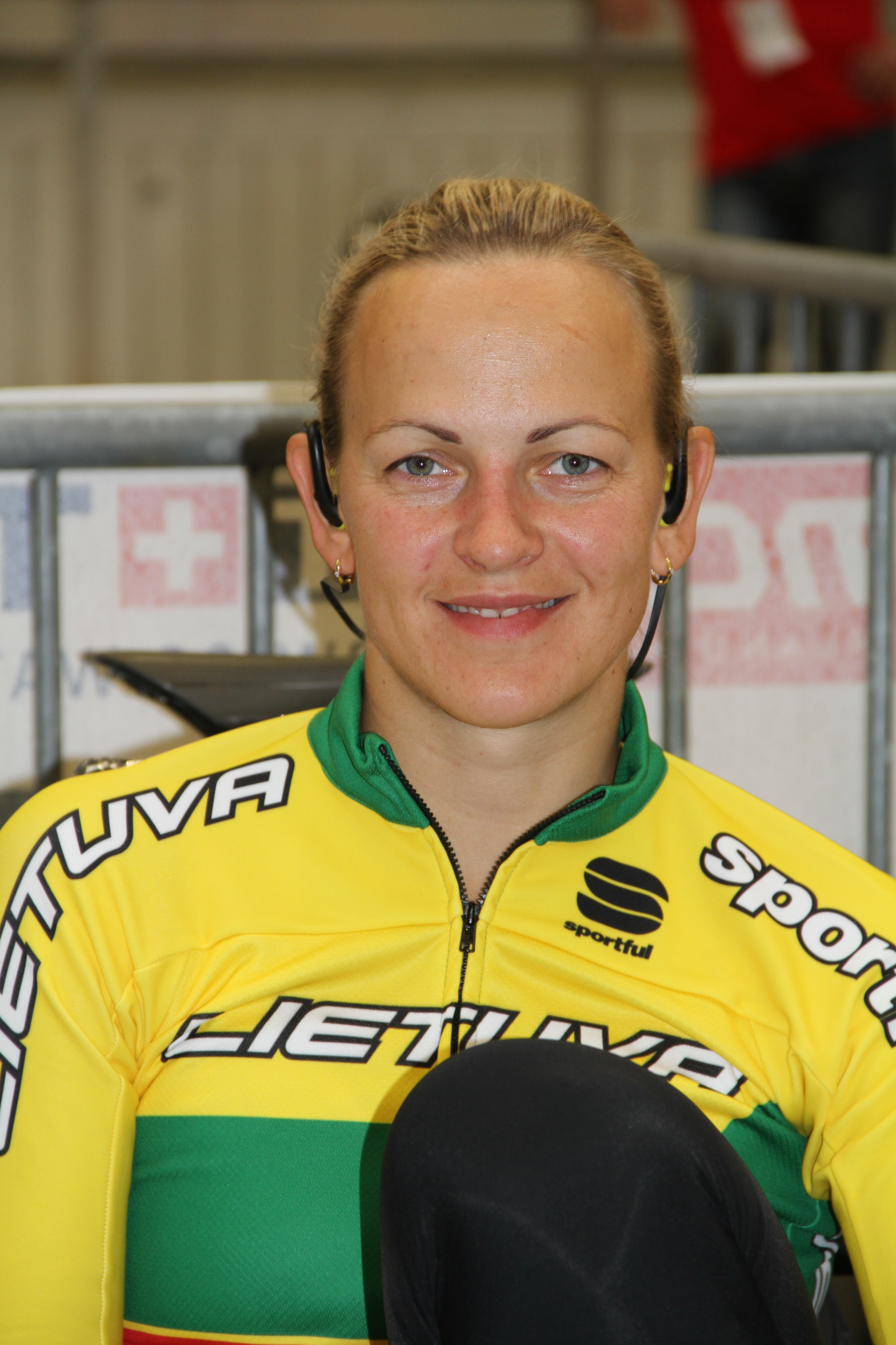 Simona Krupeckaitė, litauische Radsportlerin The making of this document was supported by the Community-Budget of Wikimedia Germany.